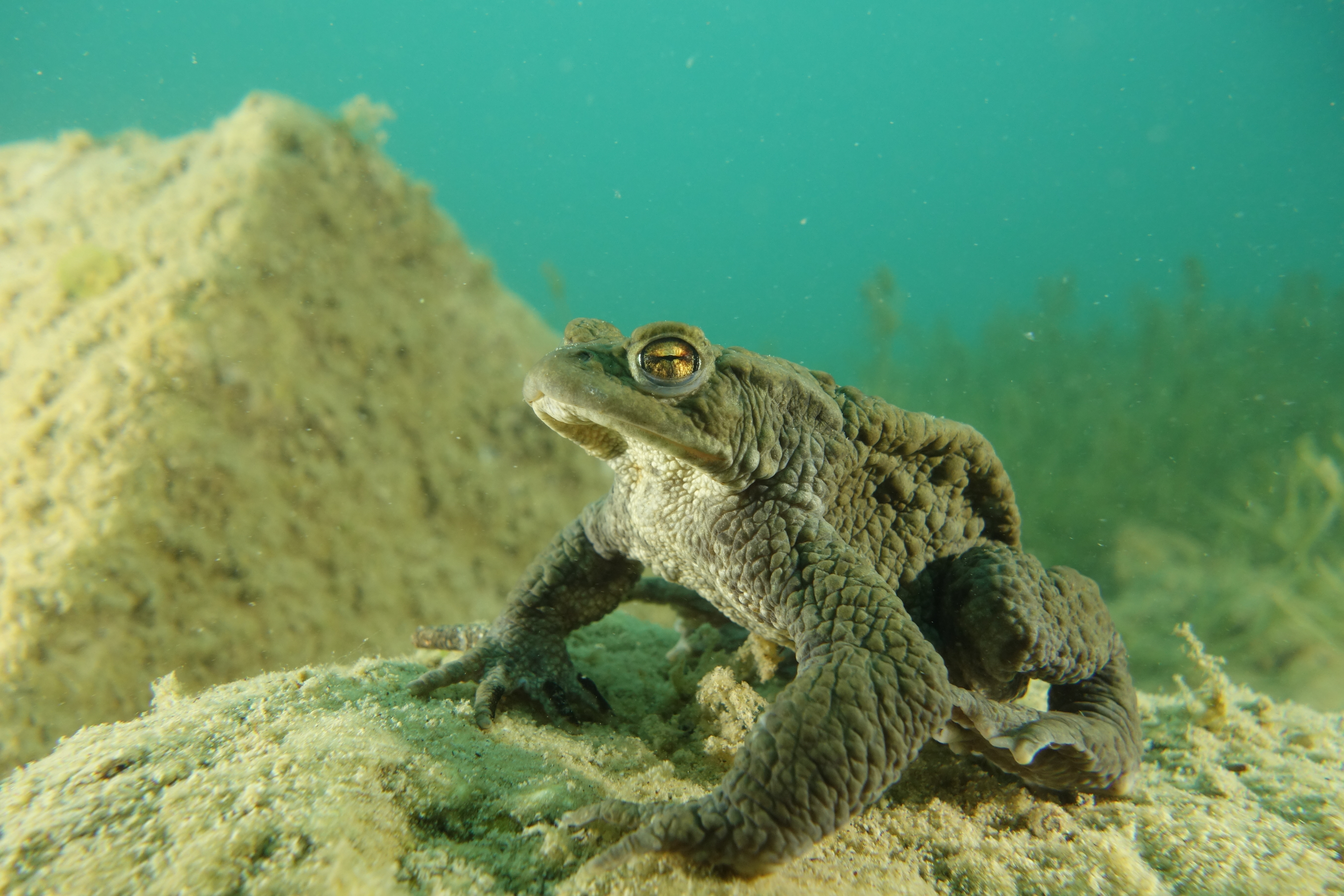 Erdkröte unter Wasser im Vierwaldstättersee im Monat April 2016